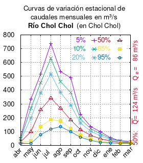 Curvas de variación estacional del río Chol Chol en Chol Chol. # Dirección General de Aguas # Diagnóstico y clasificación de los cursos y cuerpos de agua según objetivos de calidad. Cuenca del río Imperial. # Santiago de Chile # Ministerio de Obras Públicas (Chile) # 2004 # url: # urlarchivo: # Tabla 4.7: Río Chol Chol en Chol Chol (m3/s) , pág. 51 mes 5% 10% 20% 50% 85% 95% abr 60.719 48.81 38.152 25.453 17.7 15.296 may 336.125 267.508 197.242 98.718 32.06 13.671 jun 517.112 452.52 380.486 259.721 137.039 76.279 jul 738.03 628.61 514.539 342.249 189.2 119.755 ago 534.388 459.7 383.071 270.346 175.991 136.768 sep 490.084 385.225 292.574 184.34 120.179 100.837 oct 223.577 192.588 160.747 113.799 74.366 57.923 nov 138.16 120.781 102.305 73.577 47.466 35.767 dic 99.829 84.692 69.398 47.427 29.676 22.532 ene 56.181 49.442 42.353 31.509 21.888 17.672 feb 34.733 31.837 28.65 23.419 18.27 15.79 mar 29.26 26.958 24.558 20.934 17.714 16.253 This plot was created with Gnuplot.